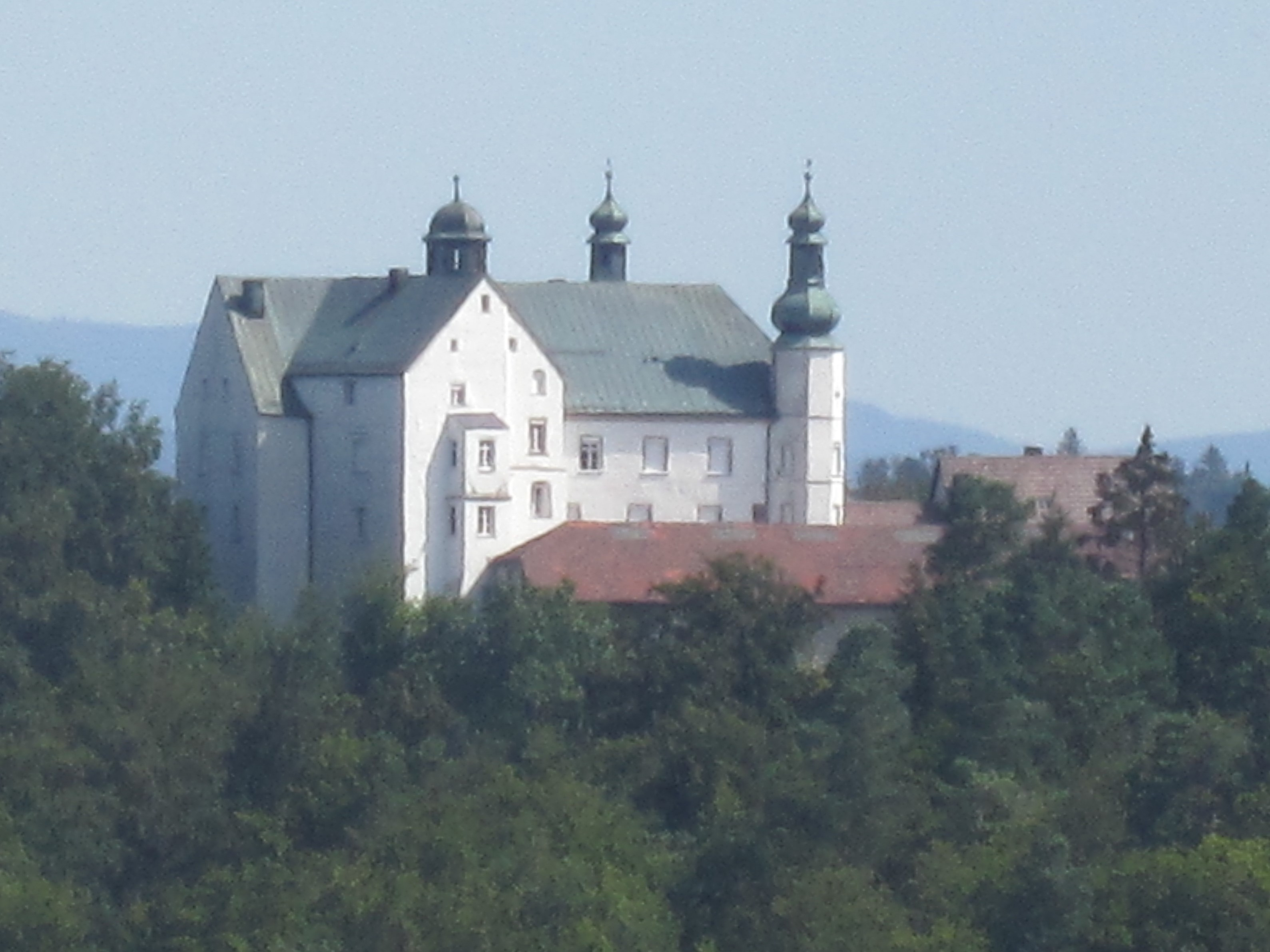 Blick von Schloss Fürstenstein zur Engelburg im Dreiburgenland (Landkreis Passau / Niederbayern)